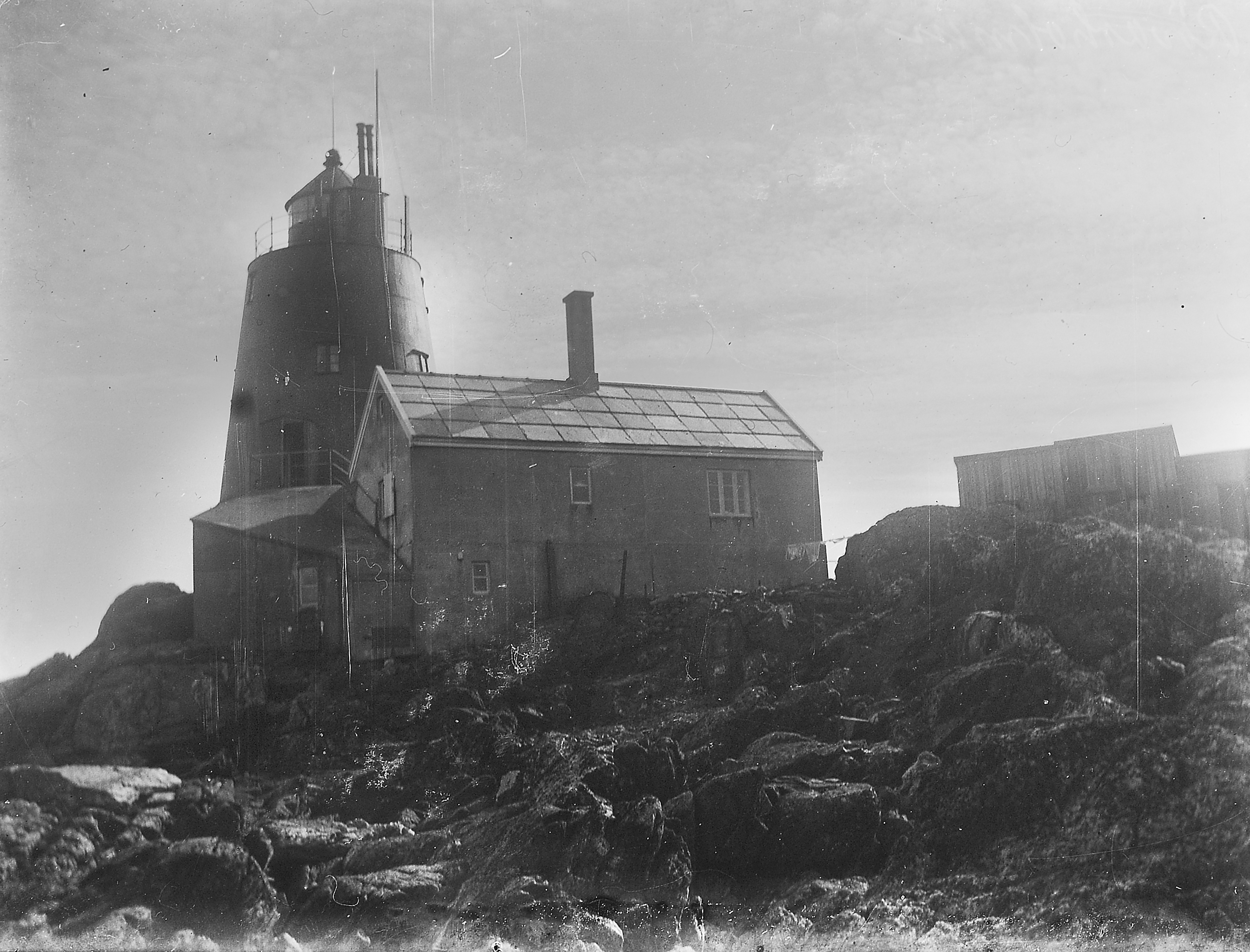 Bildet er hentet fra Arkivverket. Røværsholmen, Haugesund Arkivinstitusjon : Riksarkivet Arkivnavn : Fyrdirektoratet Sted : Norge, Rogaland, Haugesund, Emneord: Fyr, Kyst Avbildet